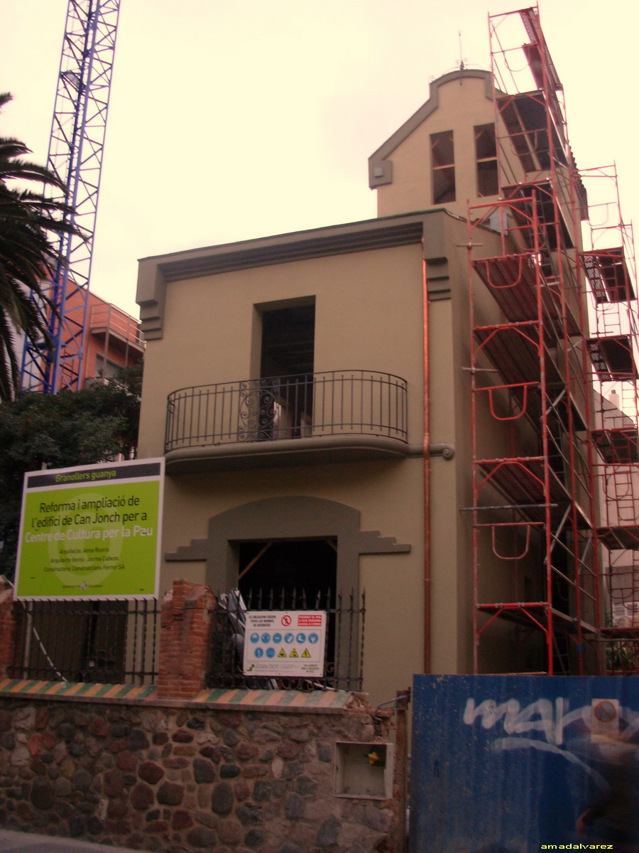 Casa Adela Roca (Can Jonch) C/Rec 19 (Granollers-Vallès Oriental-Catalunya), obra atribuida a Manuel Raspall 1913